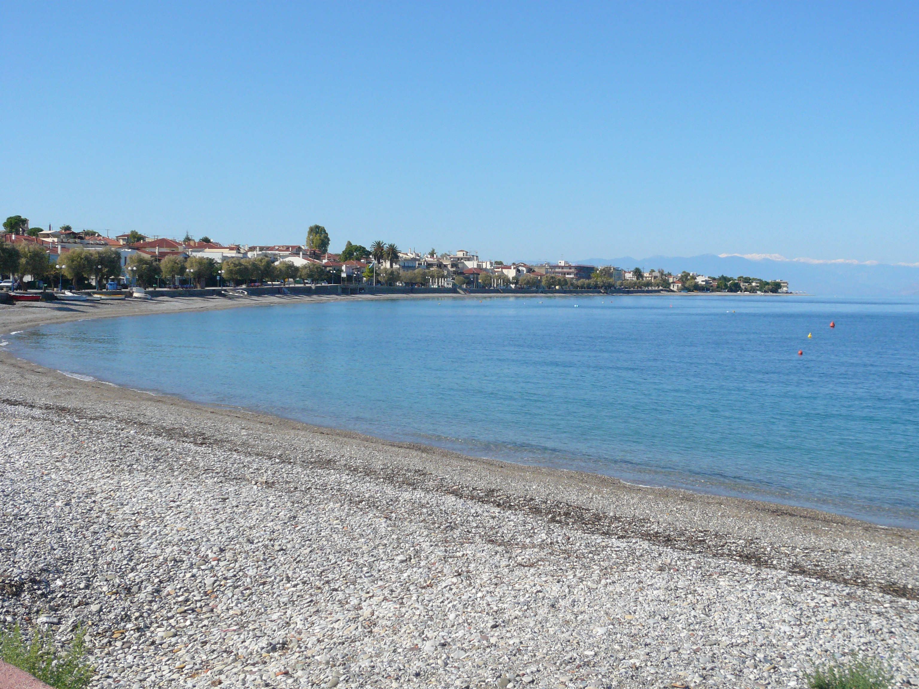 Παραλία Συκιάς Κορινθίας